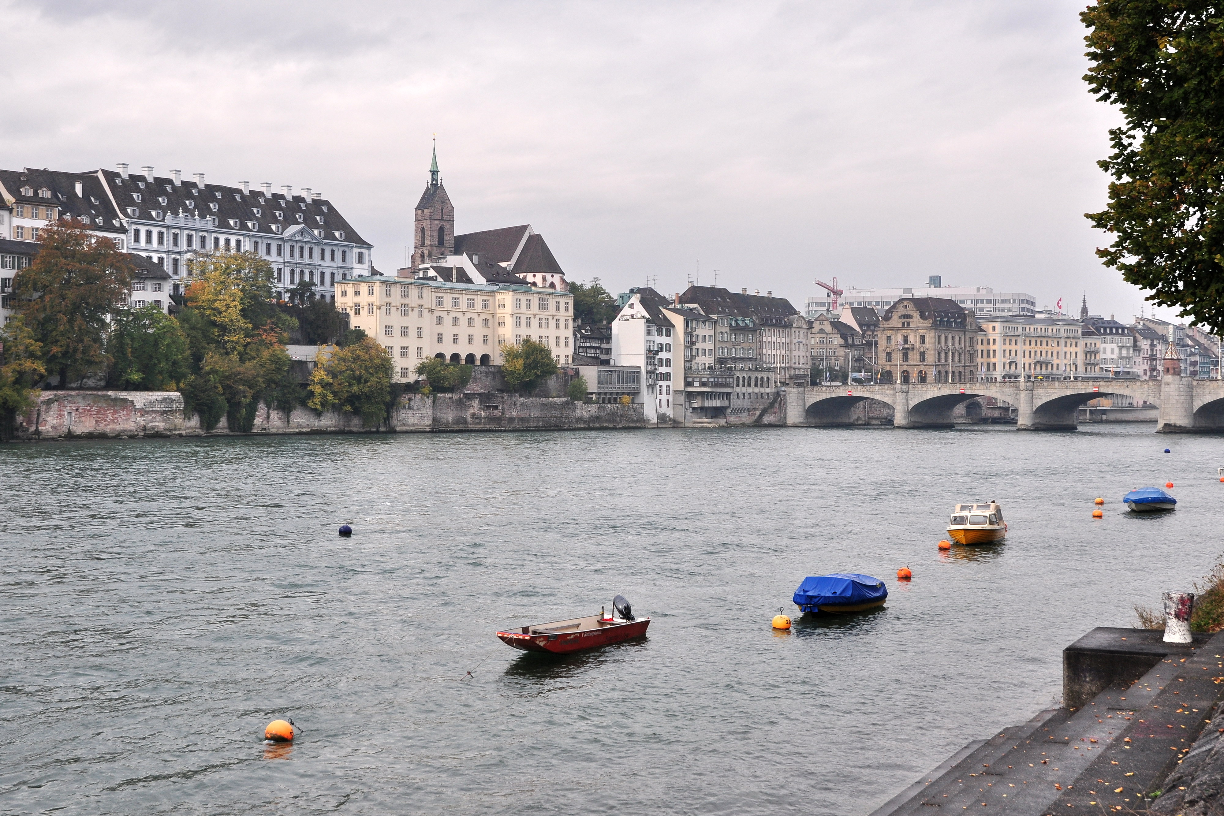 Mittlere Rheinbrücke in Basel (Switzerland)